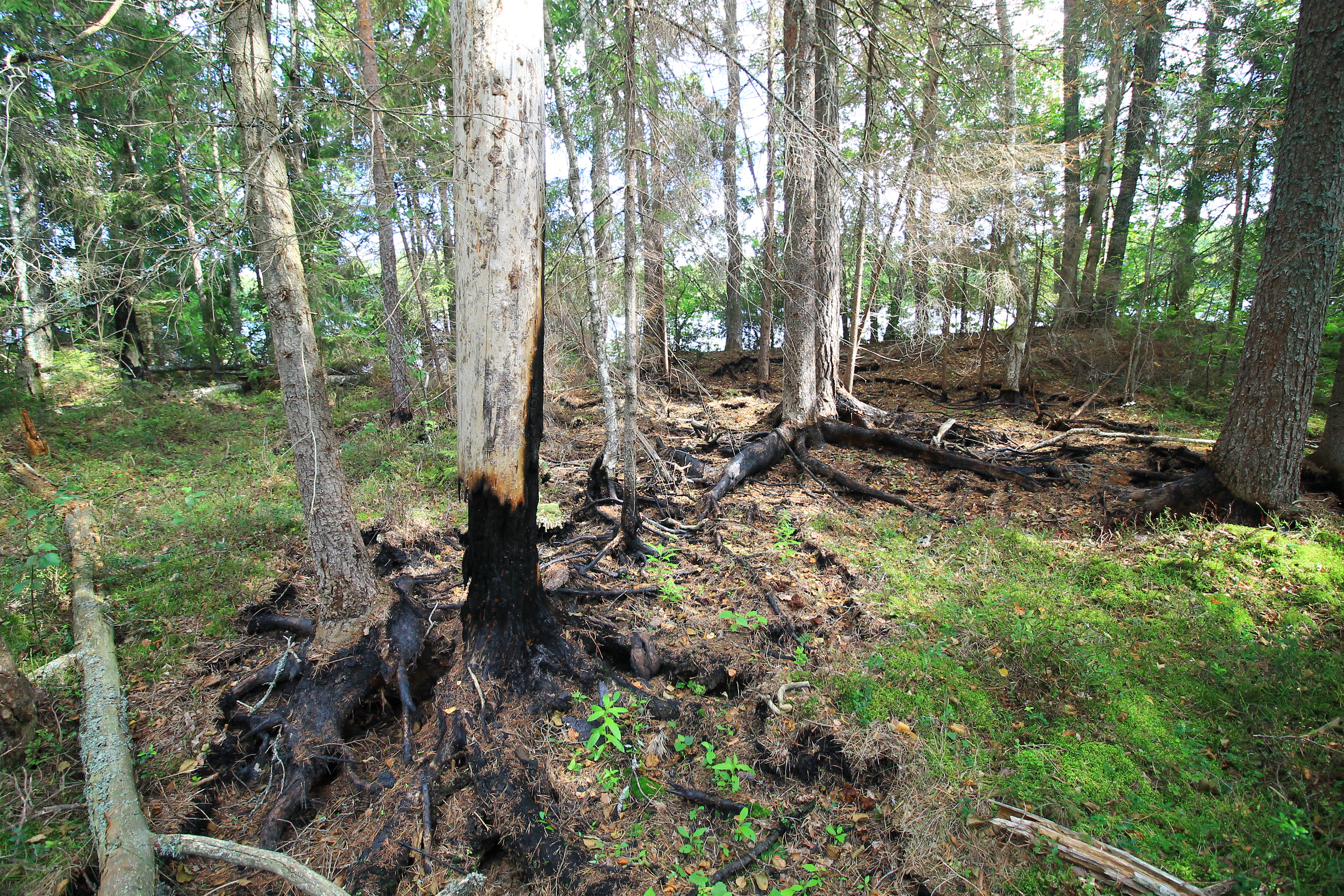 Последствия пожара на побережье озера Лошамьё летом 2019 года